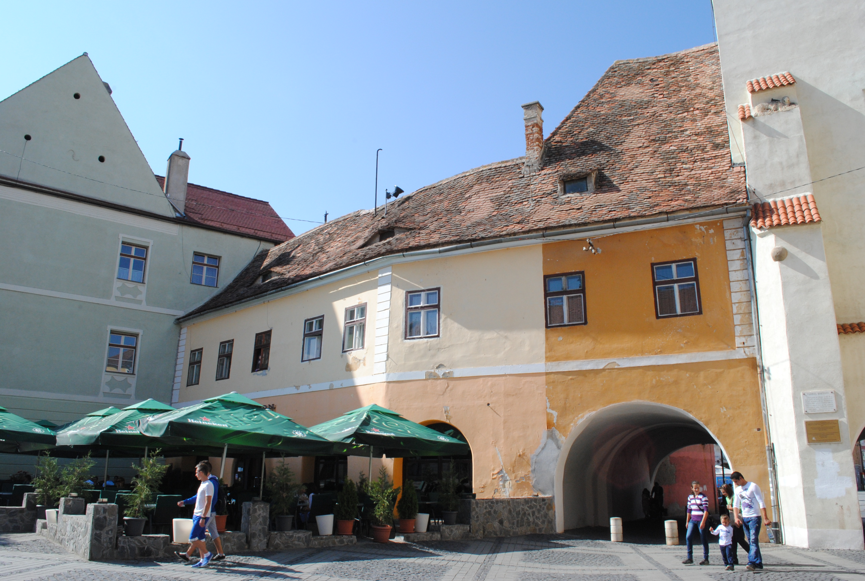 Casă, la parter restaurantul "La Turn" sec. XV - XVI,1652, sec. XX